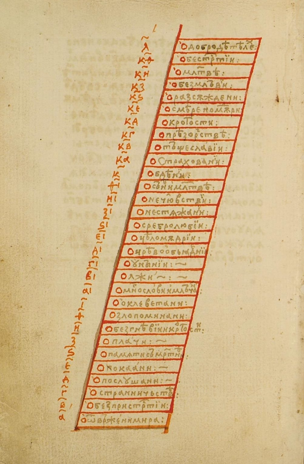 Лествица Иоанна Лествичника, списанная митрополитом Киприаном. Рукопись № 152. Фонд 173.I. Фундаментальное собрание библиотеки МДА.